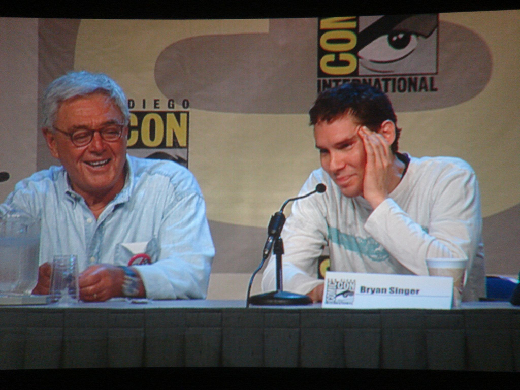 Richard Donner e Bryan Singer al Comic-Con di San Diego 2006. Autore: Kevin Tostado Fonti